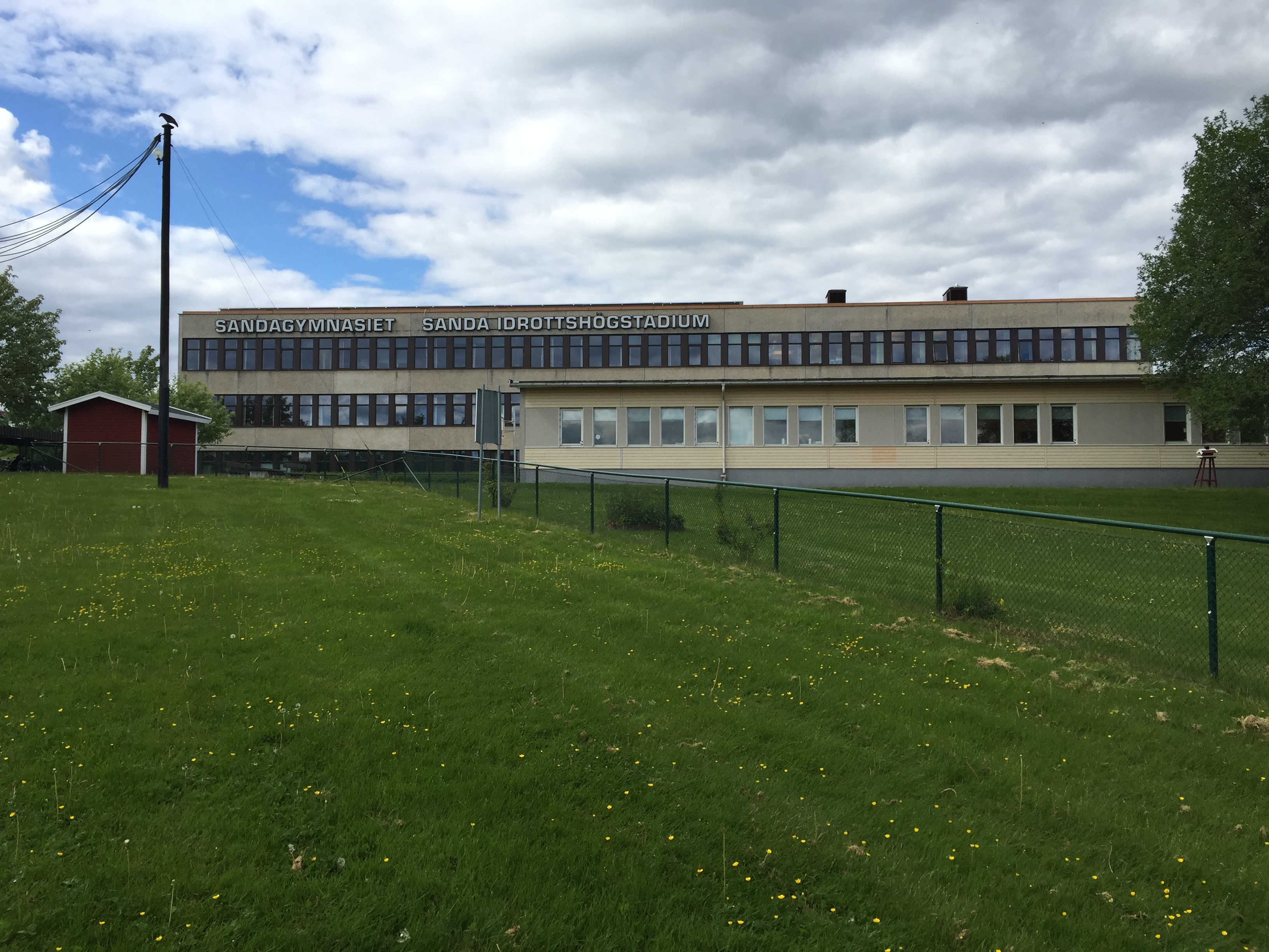 Sandagymnasiet i Huskvarna. Byggnadsår 1970. Arkitekt Helmer Flensborn